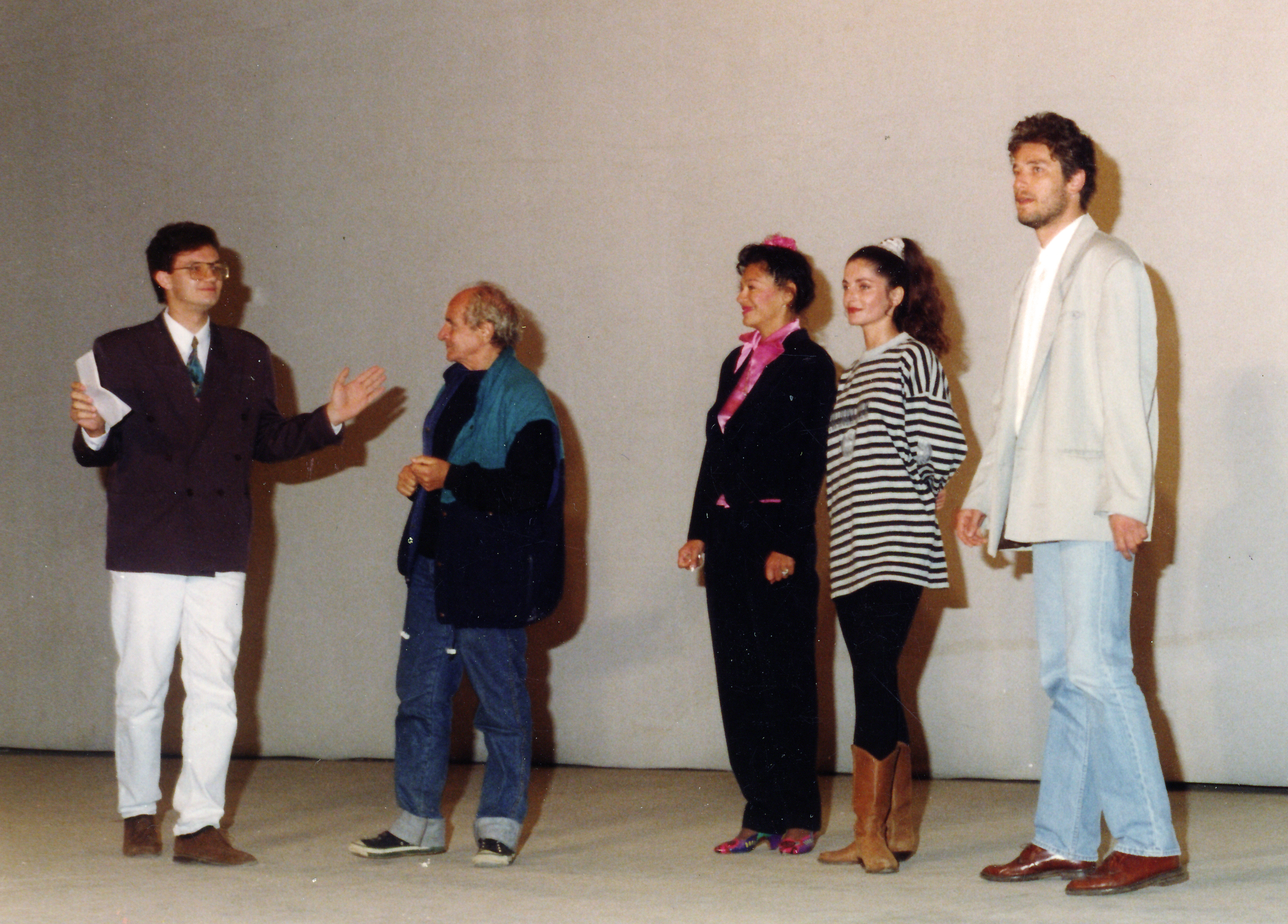 Mihajlo Bata Paskaljević, Maja Sabljić, Branka Pujić i Dragan Jovanović na Filmskim susretima u Nišu 1997. godine